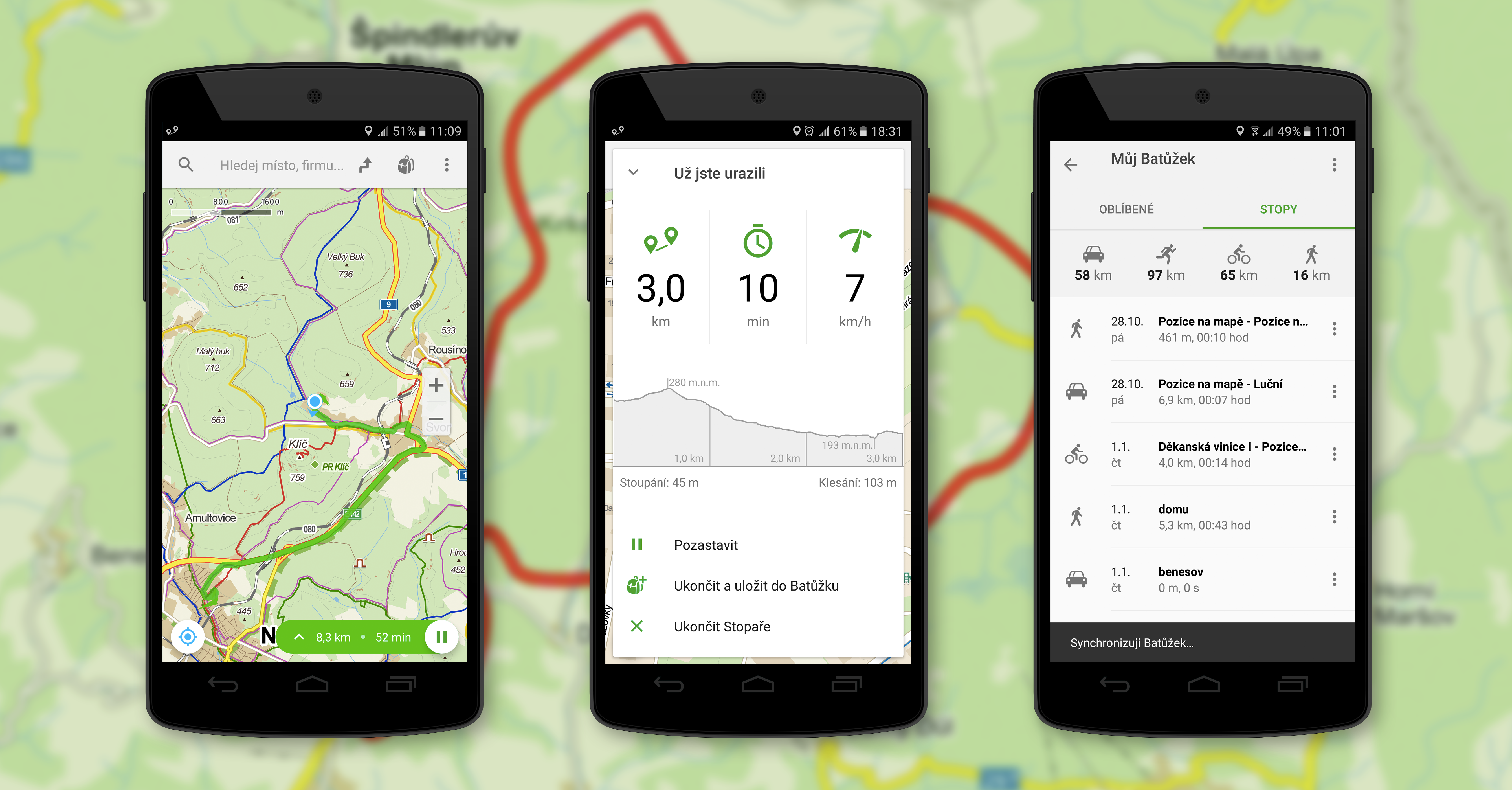 Ilustrace k mobilní k aplikaci Mapy.cz